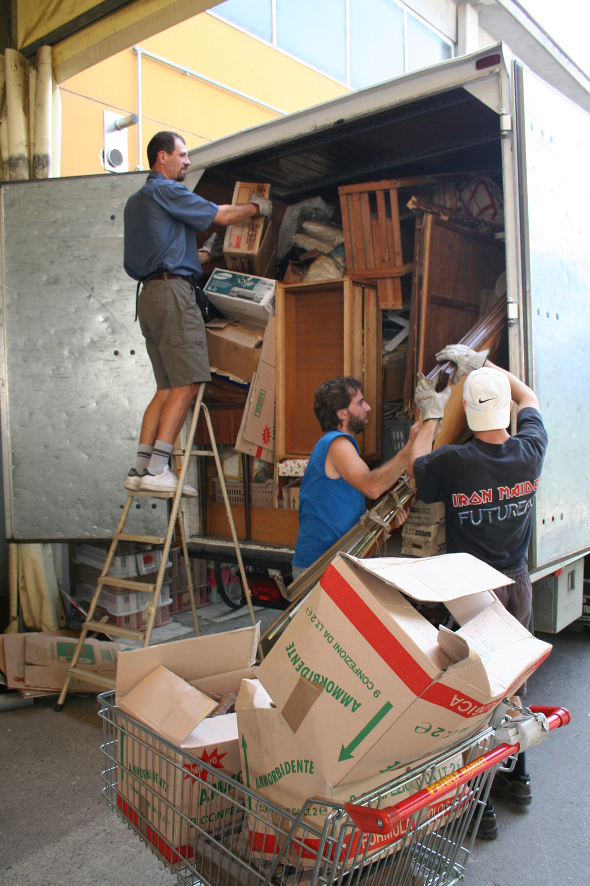 Sgombero